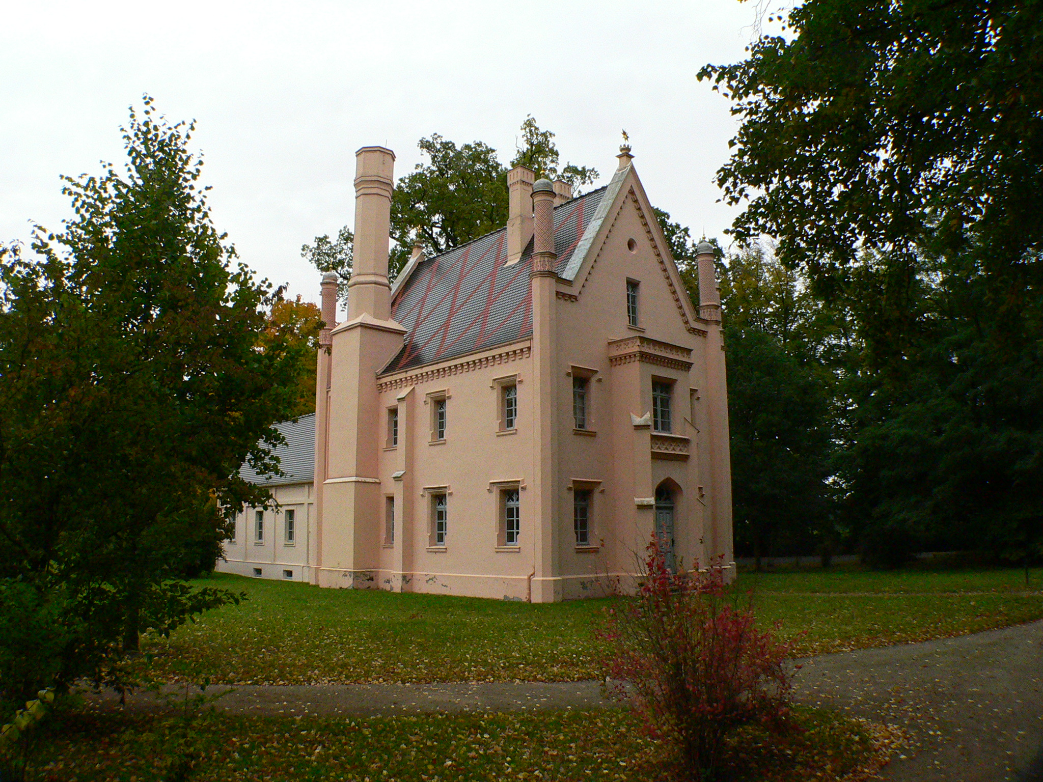 Cottbus - Branitzer Park - Schmiede